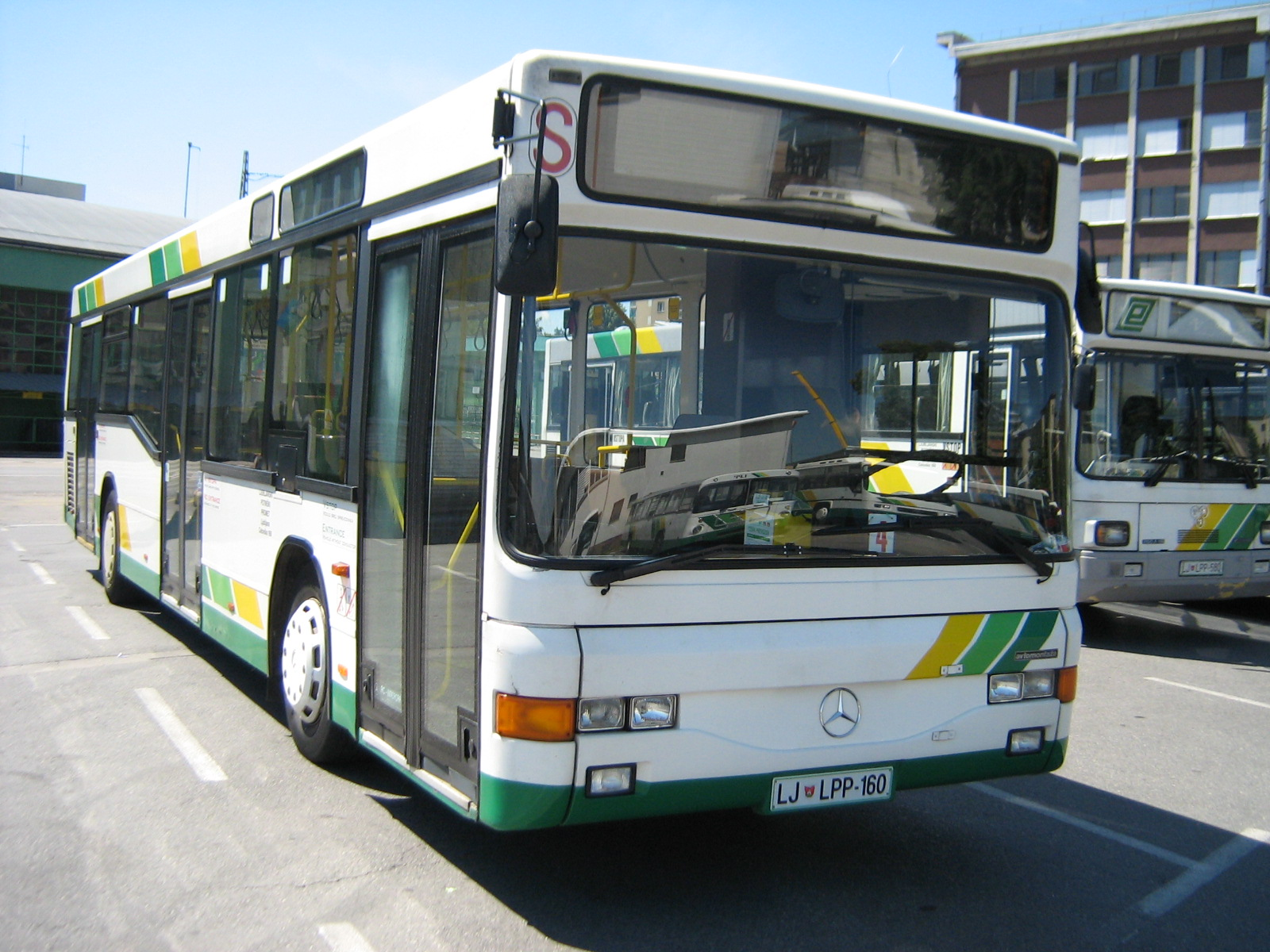 Avtobus Mercedes-Benz O504N v lasti Ljubljanskega potniškega prometa. Avtor: Uporabnik:BurekBuster